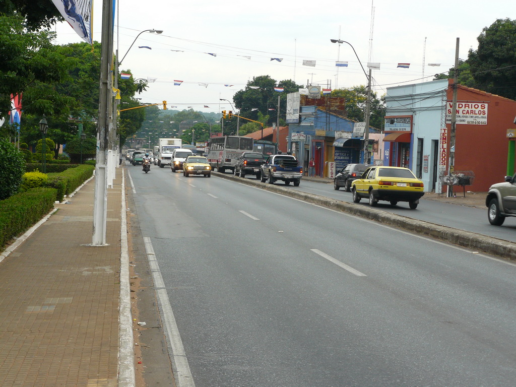 Capiatá.Paraguay